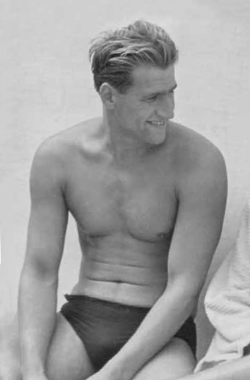 Marjan Žuželj